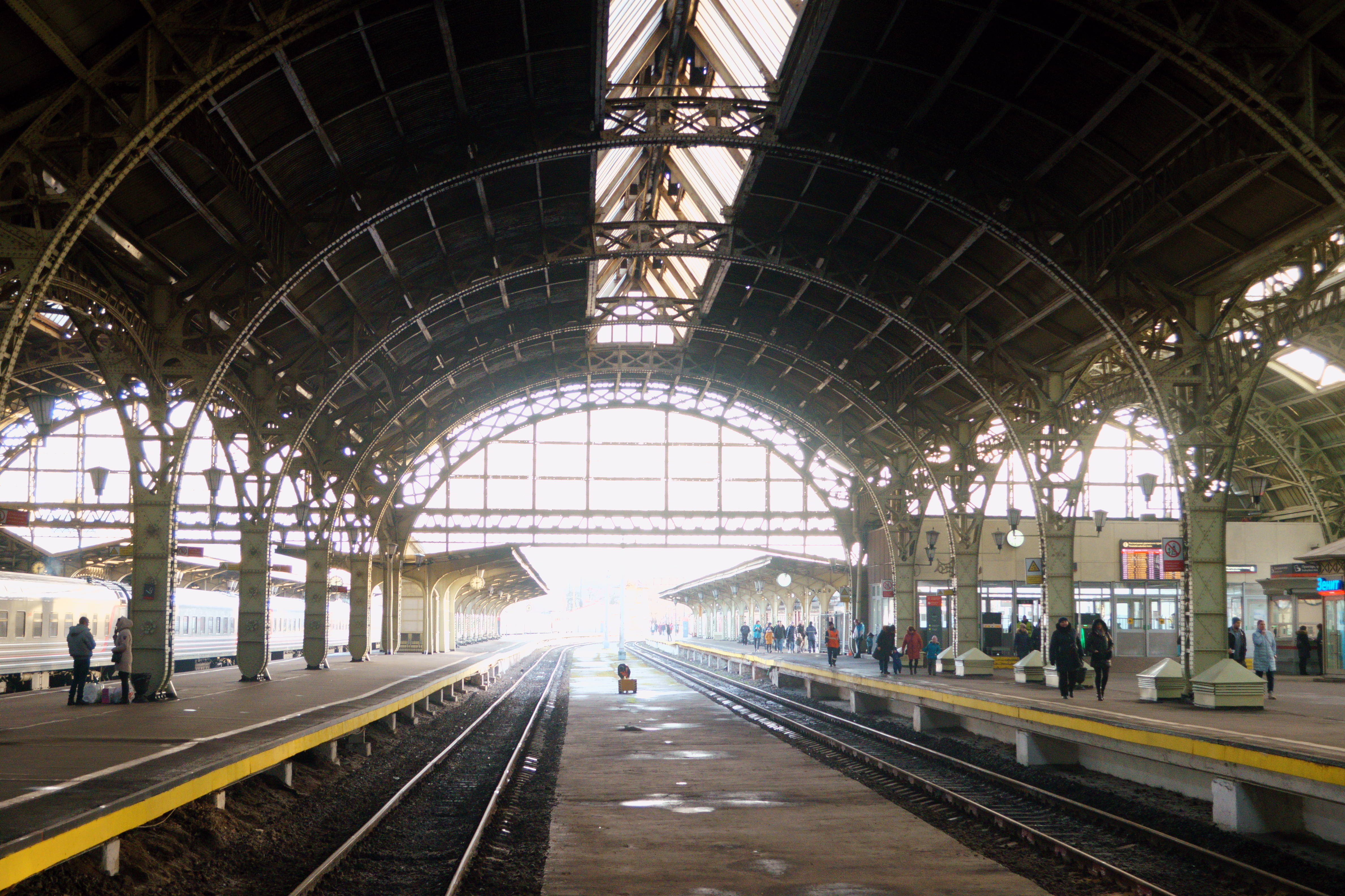 Дебаркадер: Загородный проспект, 52, Адмиралтейский район, Санкт-Петербург